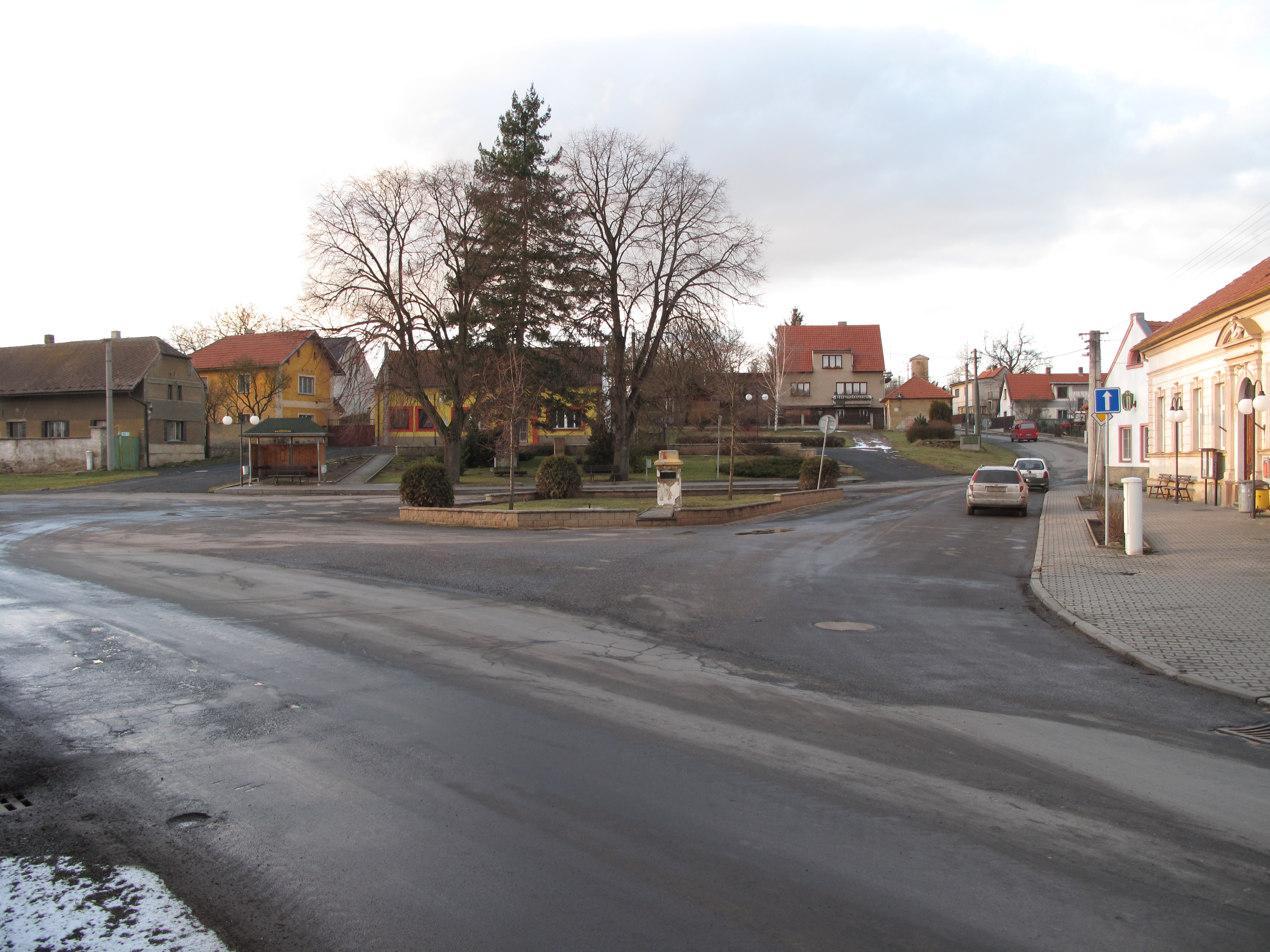 Náměstí v Hořešovicích. Okres Kladno, Česká republika.